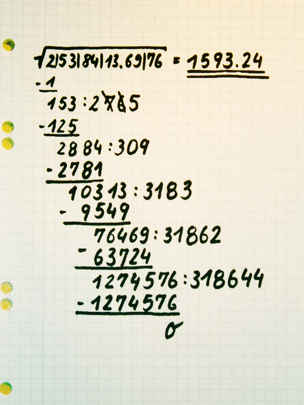 Zeigt das ziehen einer Quadratwurzel von Hand